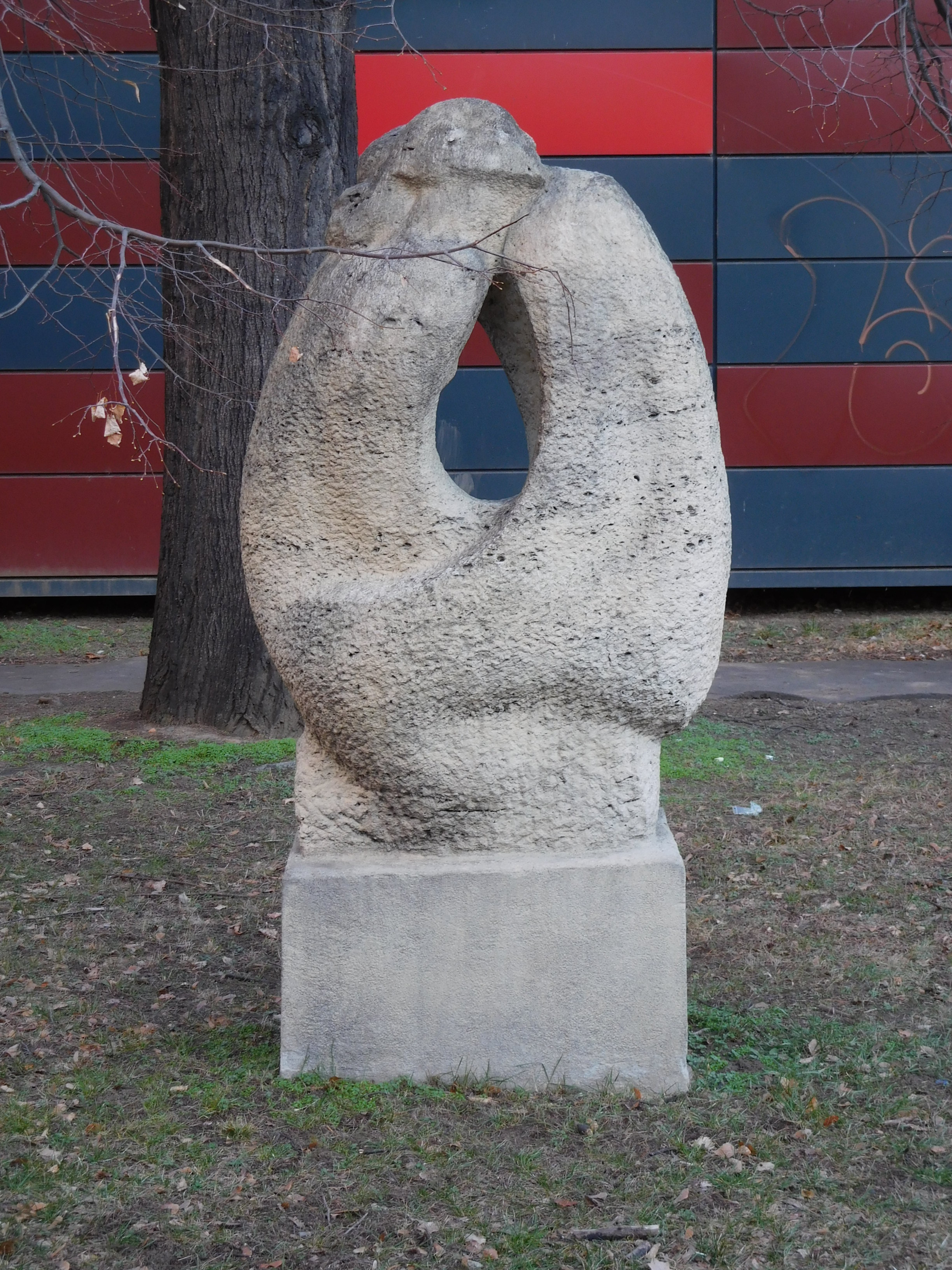 Praha - Pankrác, Na Pankráci; plastika (Věra Merhautová: Milenci, 1972)